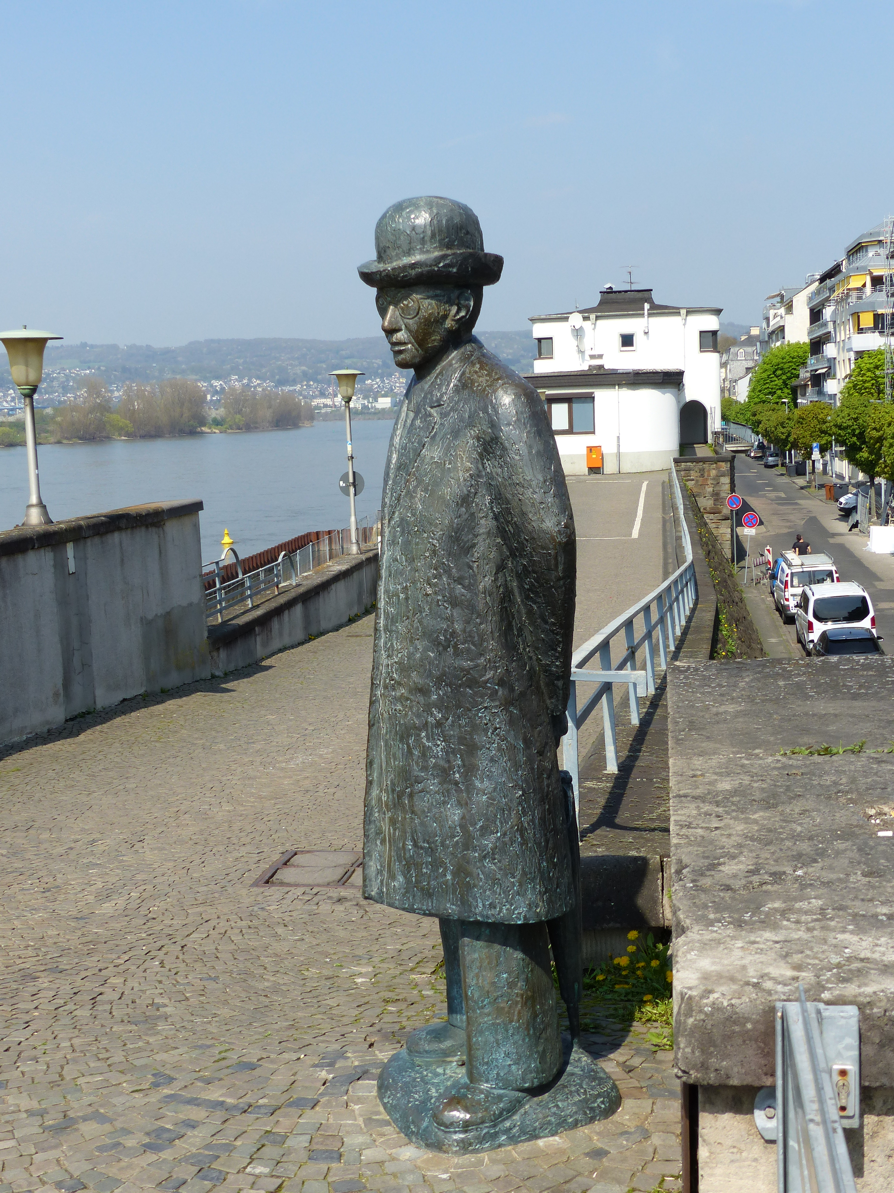 Denkmal für Robert Krups auf dem Hochwasserschutzdeich von Neuwied. Im Hintergrund die "Deichkrone".